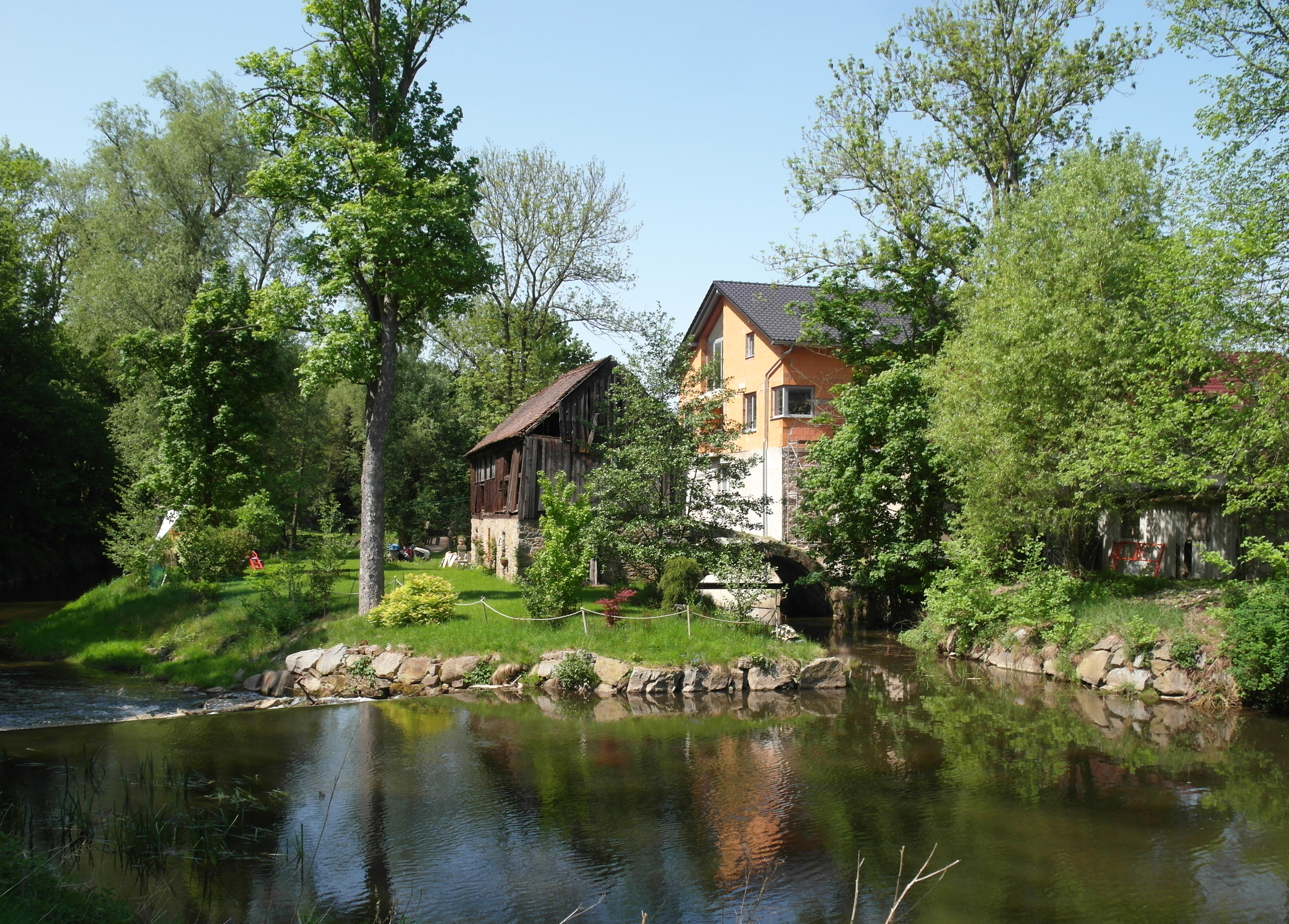 04.05.2018 01471 Großdittmannsdorf (Radeburg): Wassermühle in der Großen Röder, Bodener Straße 2 (GMP: 51.204843,13.764529). In einem Erbkaufkontrakt von 1780 erwirbt der Kaufmann Christian Gottfried Schmidt zu Schandau neben dem Rittergut Boden u.a. auch die Bodenische Mahl- und Schneidemühle. [SAM5853.JPG]20180504135DR.JPG(c)Blobelt